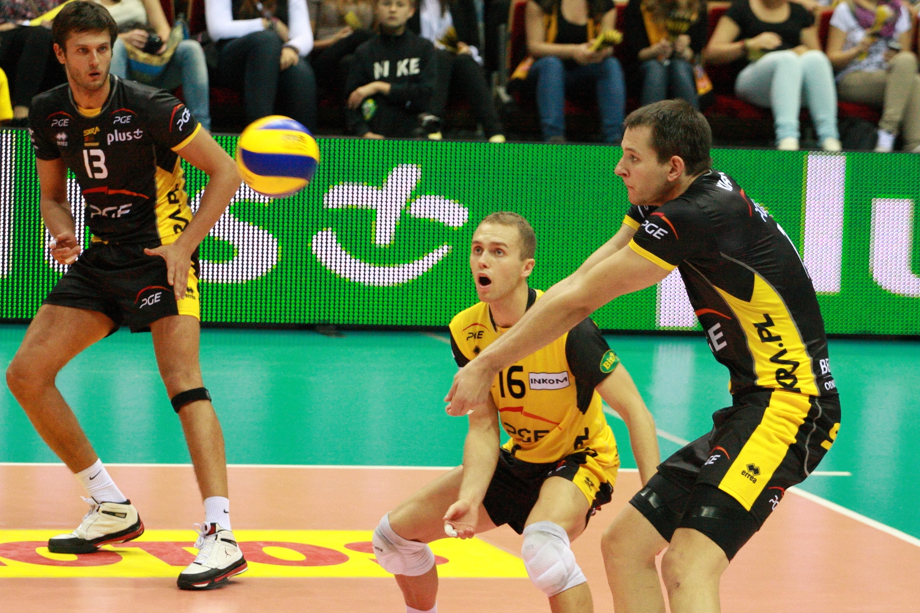 Lotos Gdańsk vs Skra Bełchatów